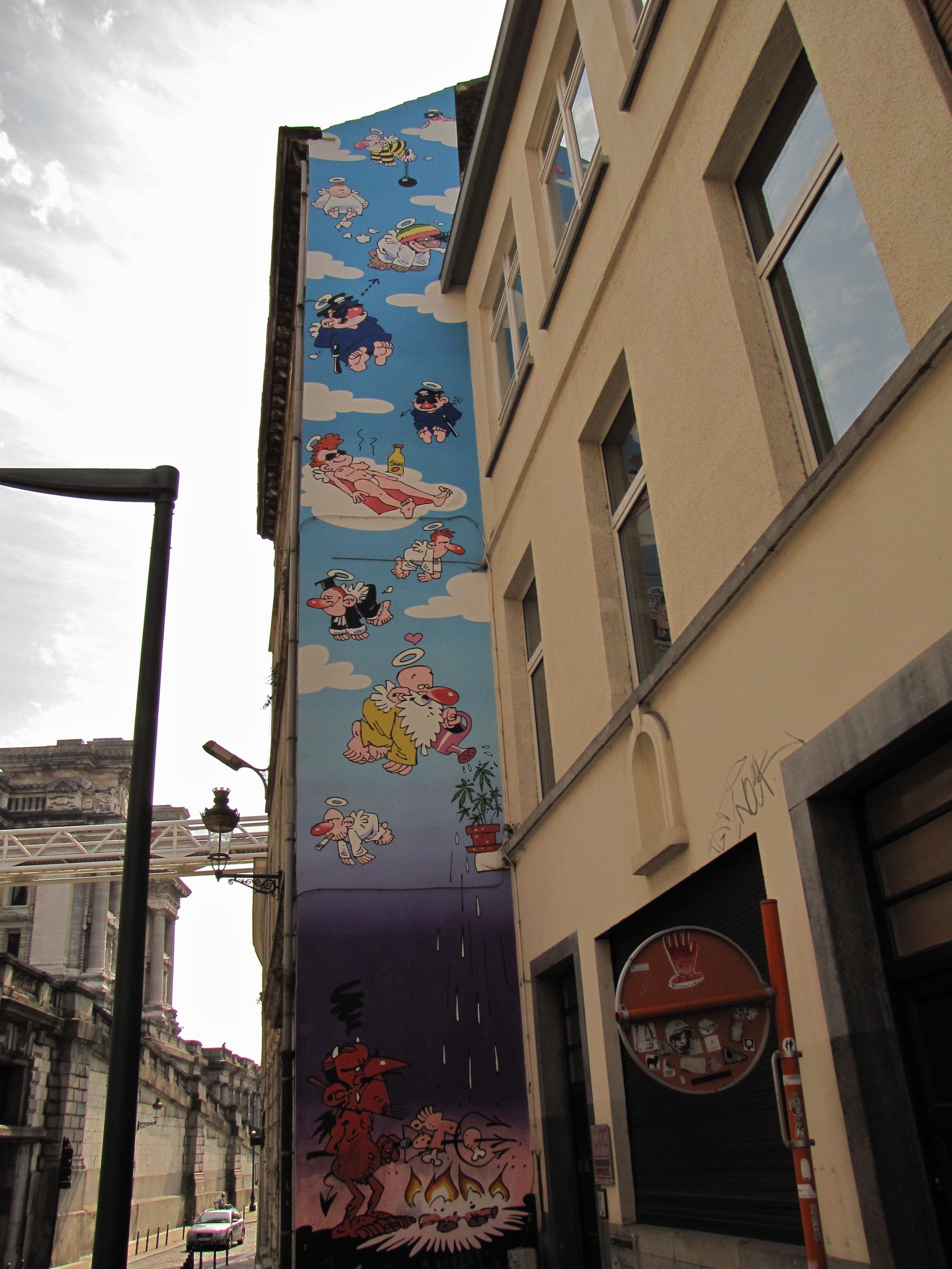 Stripmuur Oh! Lieve hemel te Miniemenstraat, Brussel